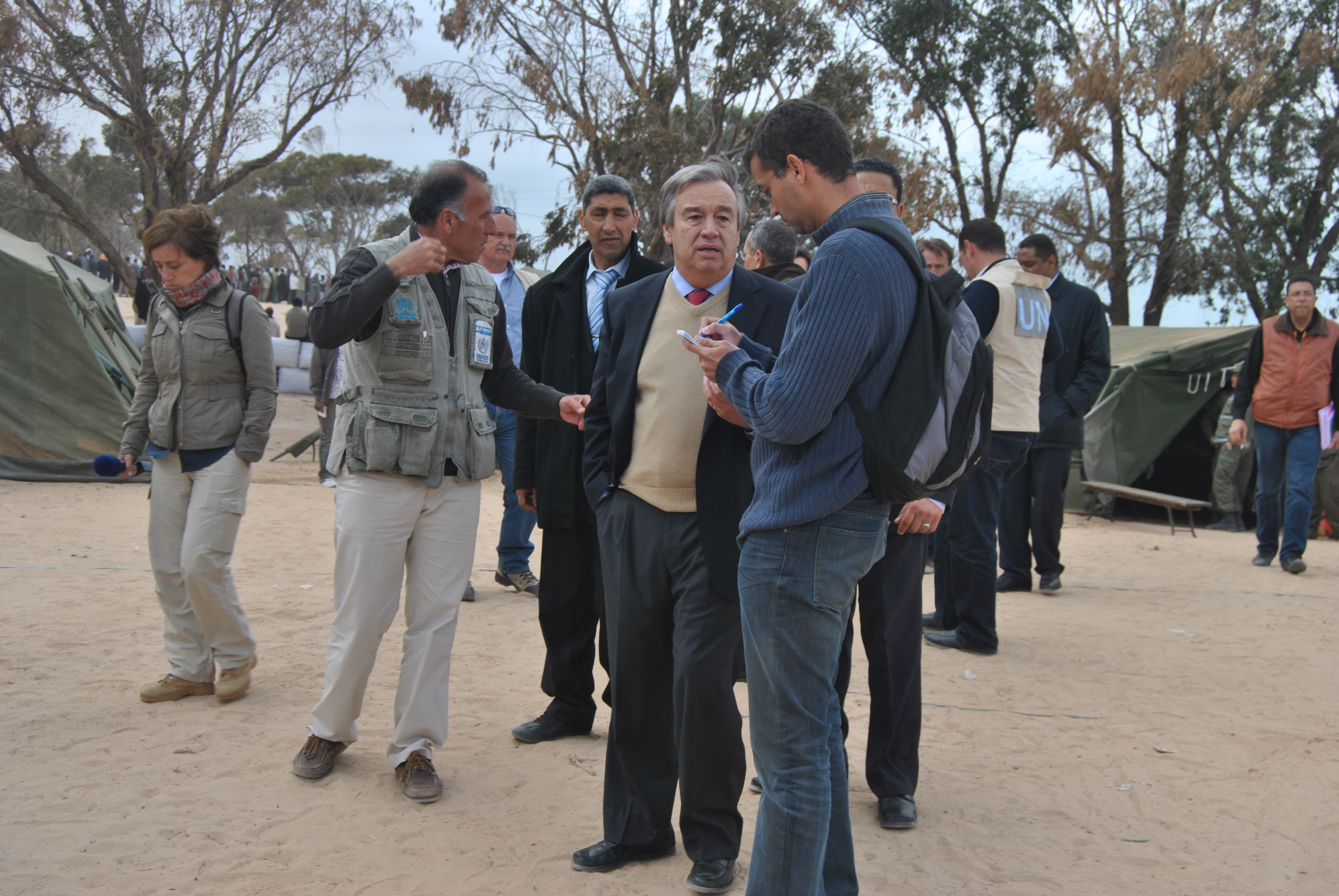 Le SG de l'ONU, António Guterres, dans la sud tunisien, au moment de la crise des réfugiés libyens à Choucha en mars-avril 2011. Il était le haut-Commissaire de l'ONU aux réfugiés (HCR).